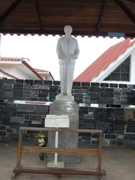 Santuario Jose Gregorio Hernandez Isnotu, estado Trujillo - Venezuela